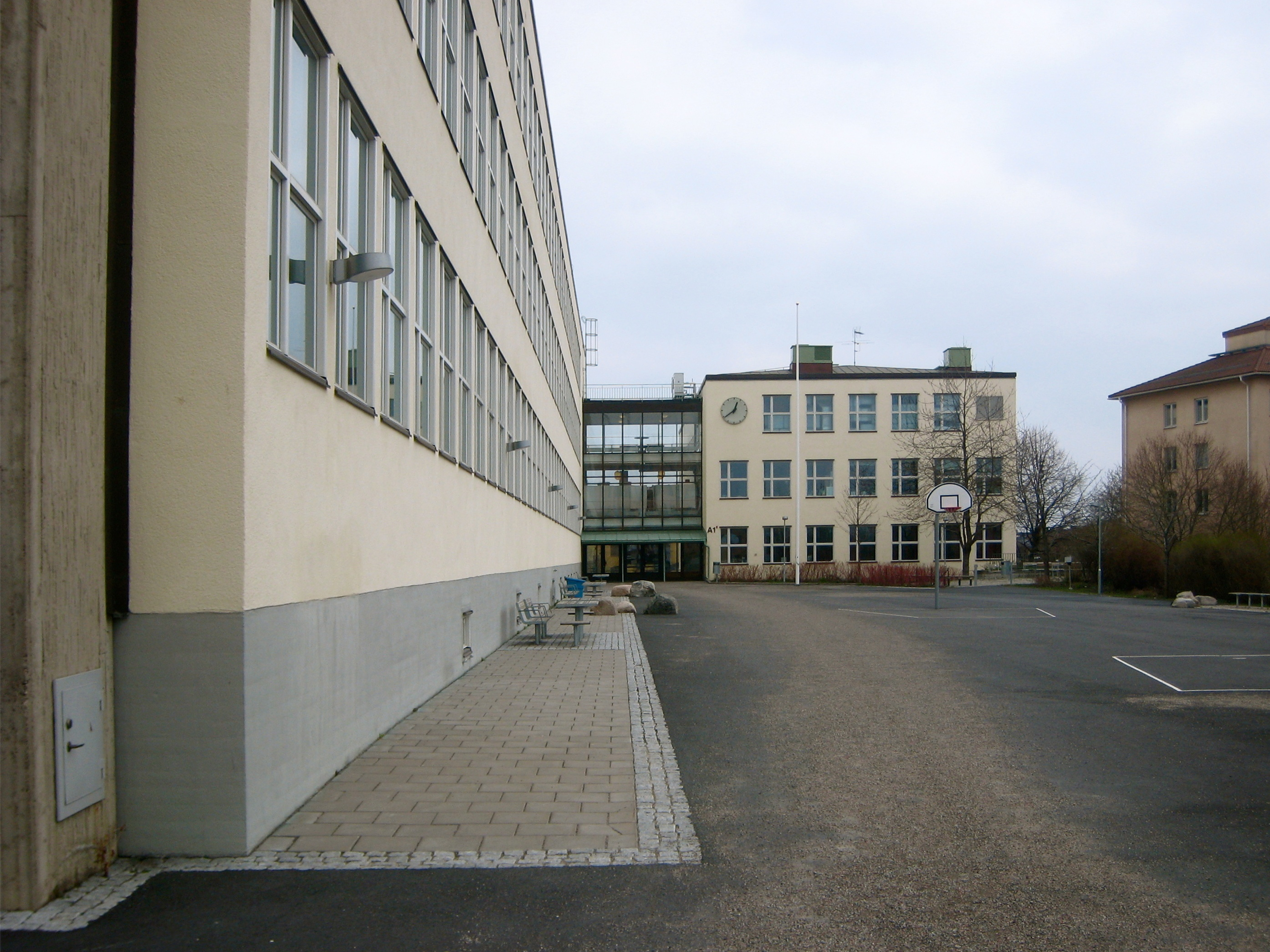 Zinkendammsskolan (today Globala gymnasiet). Architect Paul Hedqvist 1936.